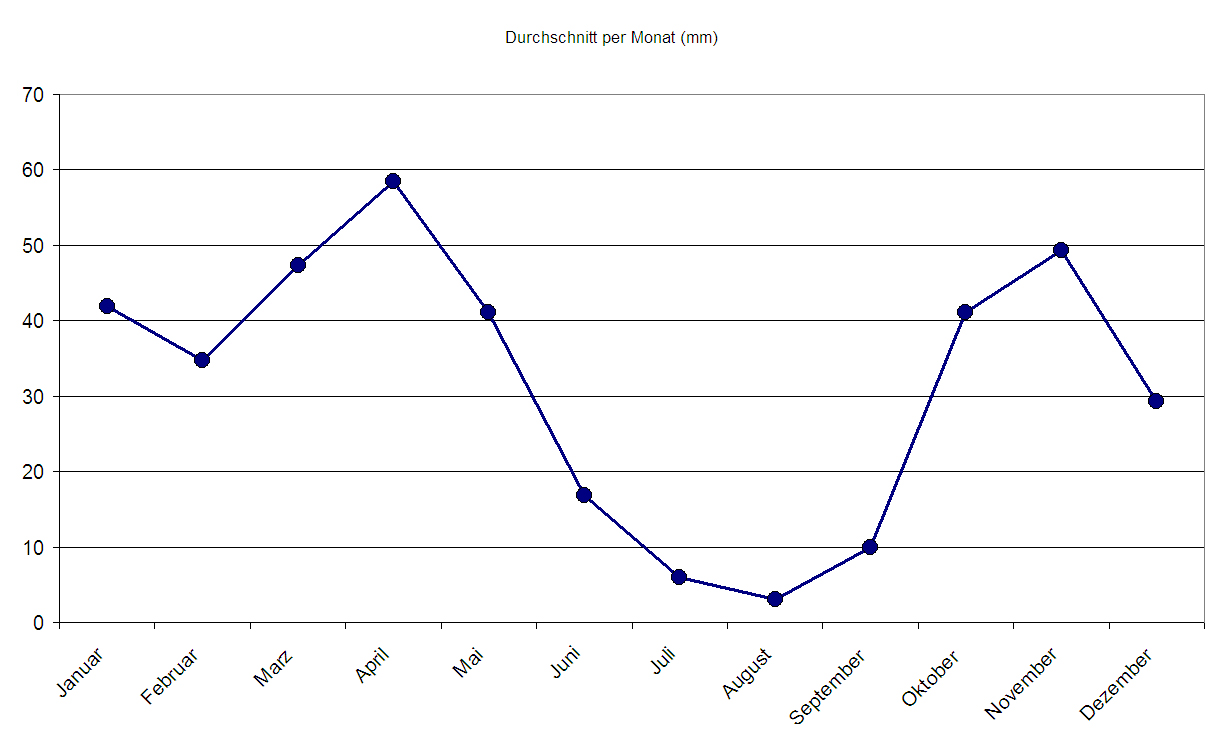 Durchschnittliche Niederschlaege im Gebiet von Van heute